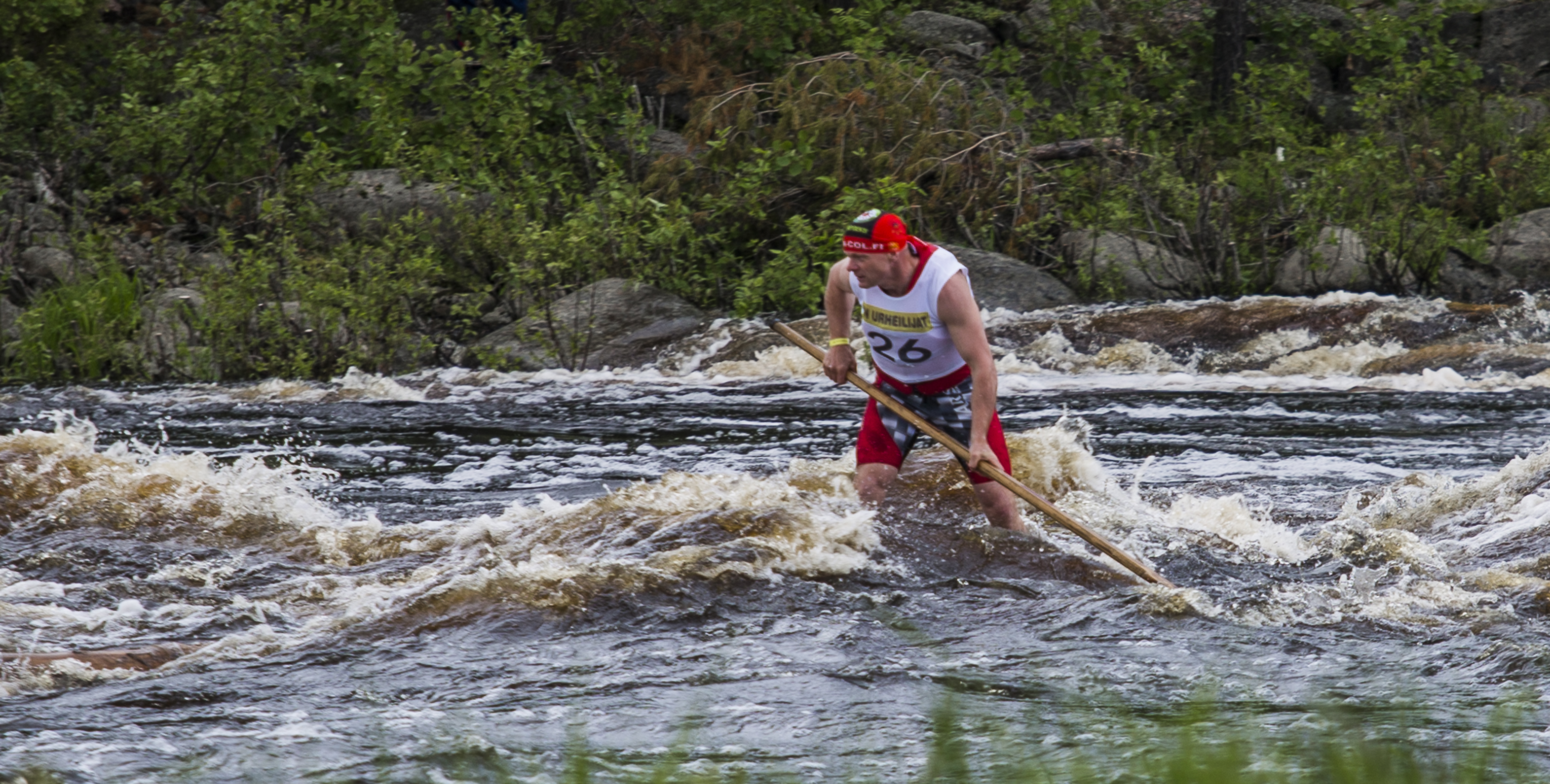 Kuningasjätkä Iin Raasakkakoskella 4.7.2015 Tukkilaiskisat, Koskenlasku